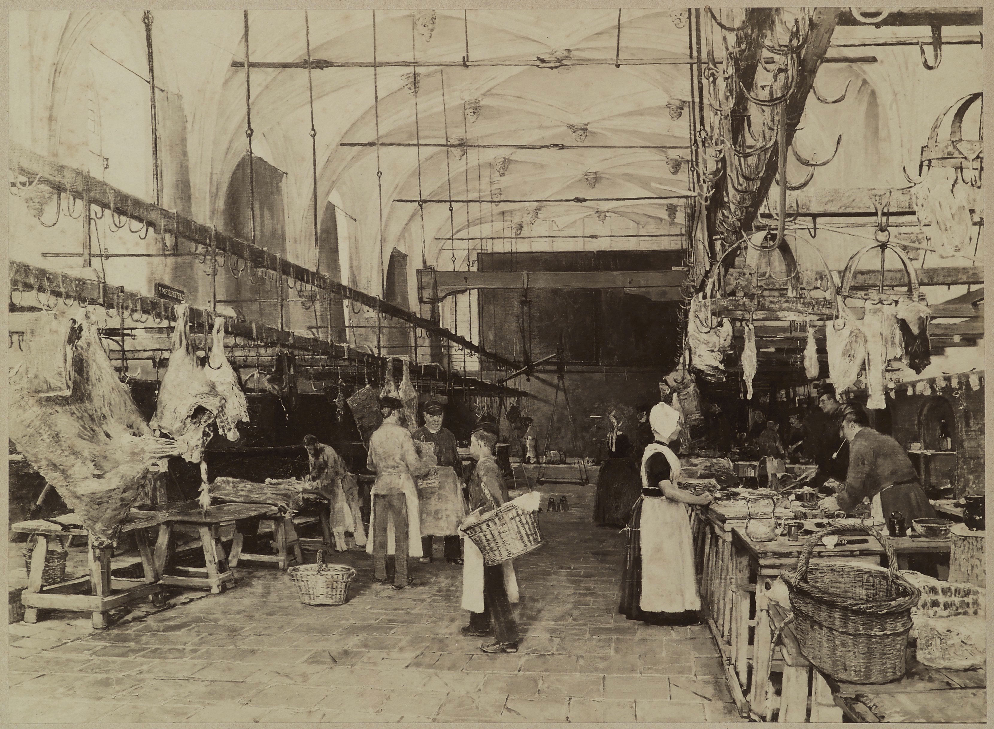 Stadhuis: Schilderij: interieur van de Vleeshal in bedrijf (opmerking: Bureau Mulder)